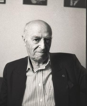 Владимир Этуш. Алексей Никишин.2008